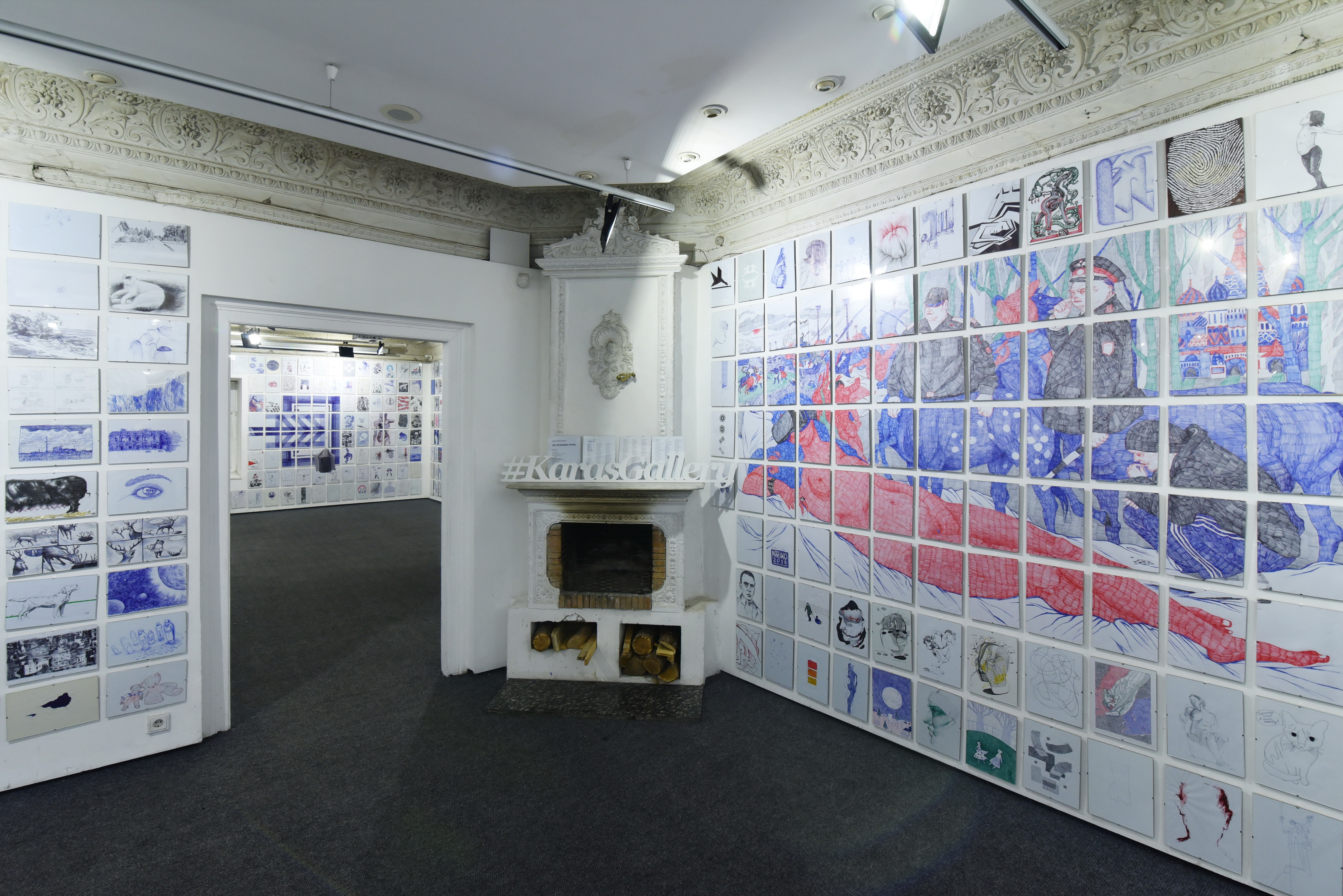 Karas Gallery A4, ballpoint Карась Галерея А4, кулькова ручка 2018 праворуч Поліптіх Маріко Гельман